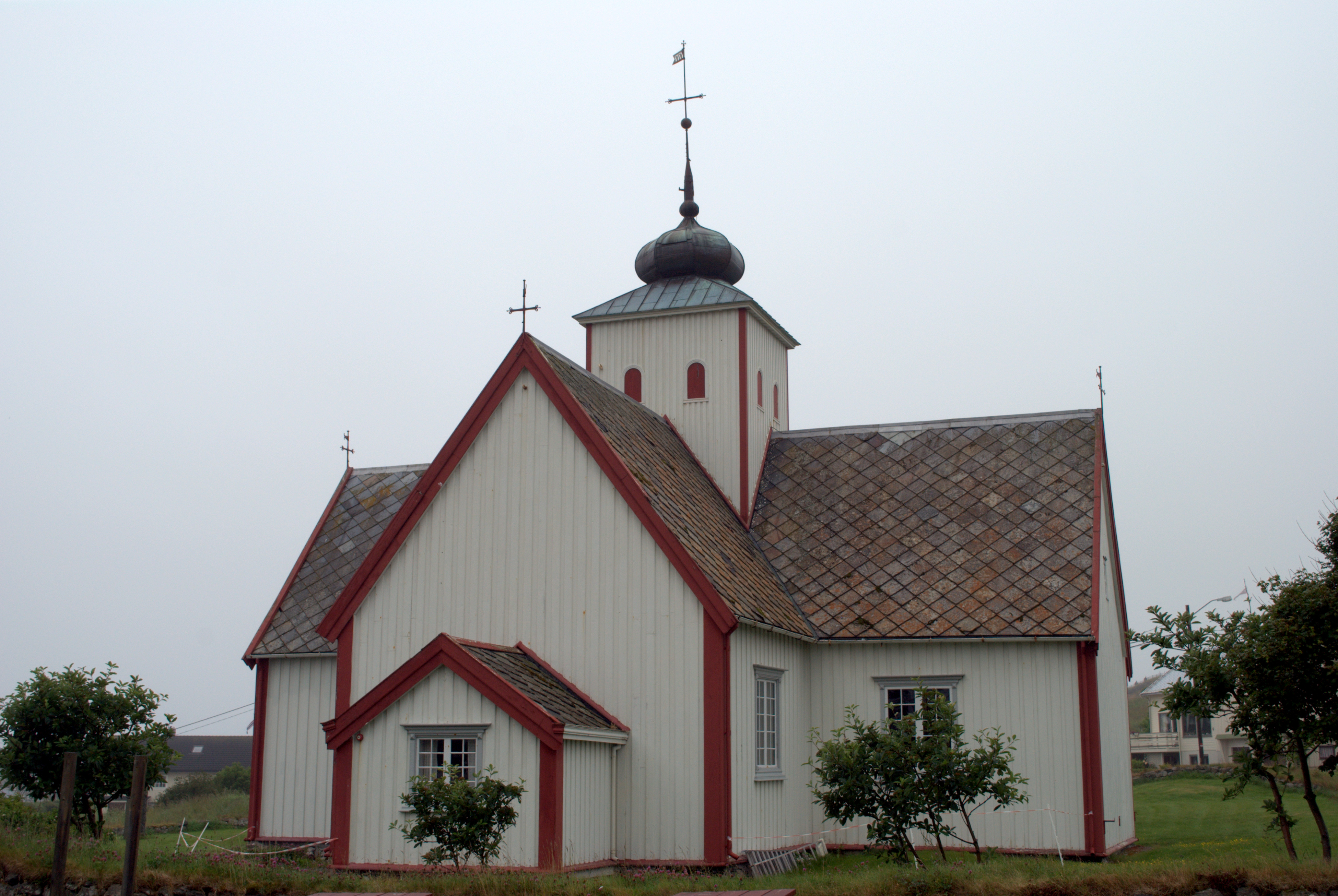 Bud kirke i Fræna, Møre og Romsdal.